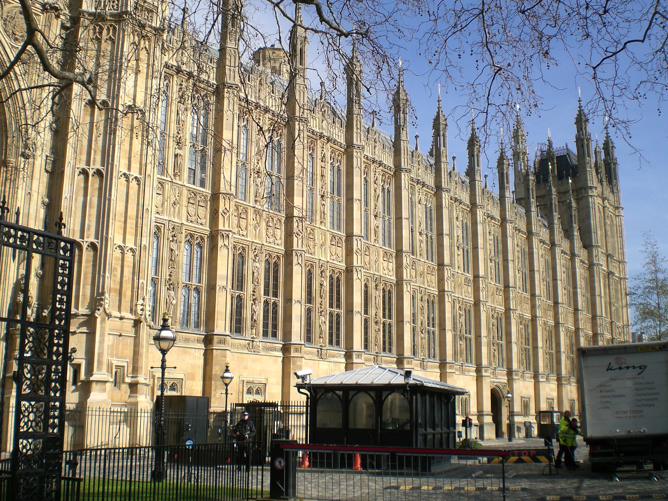 Façade du Palace of Westminster.